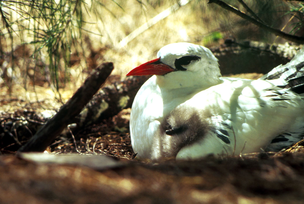 Phaéton à bec rouge - source U.S. Fish & Wildlife Service